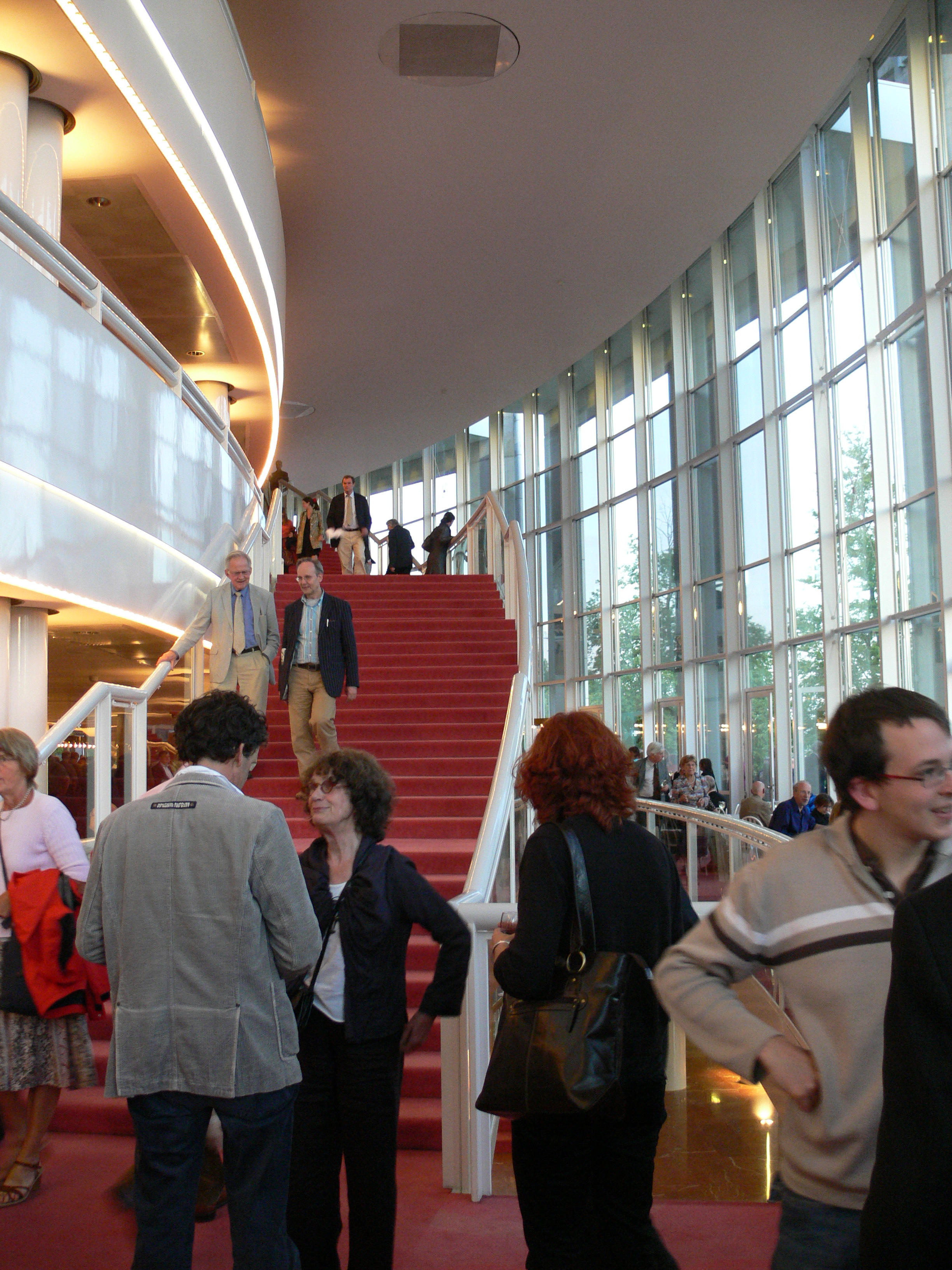 Het Muziektheater, Waterlooplein, Amsterdam